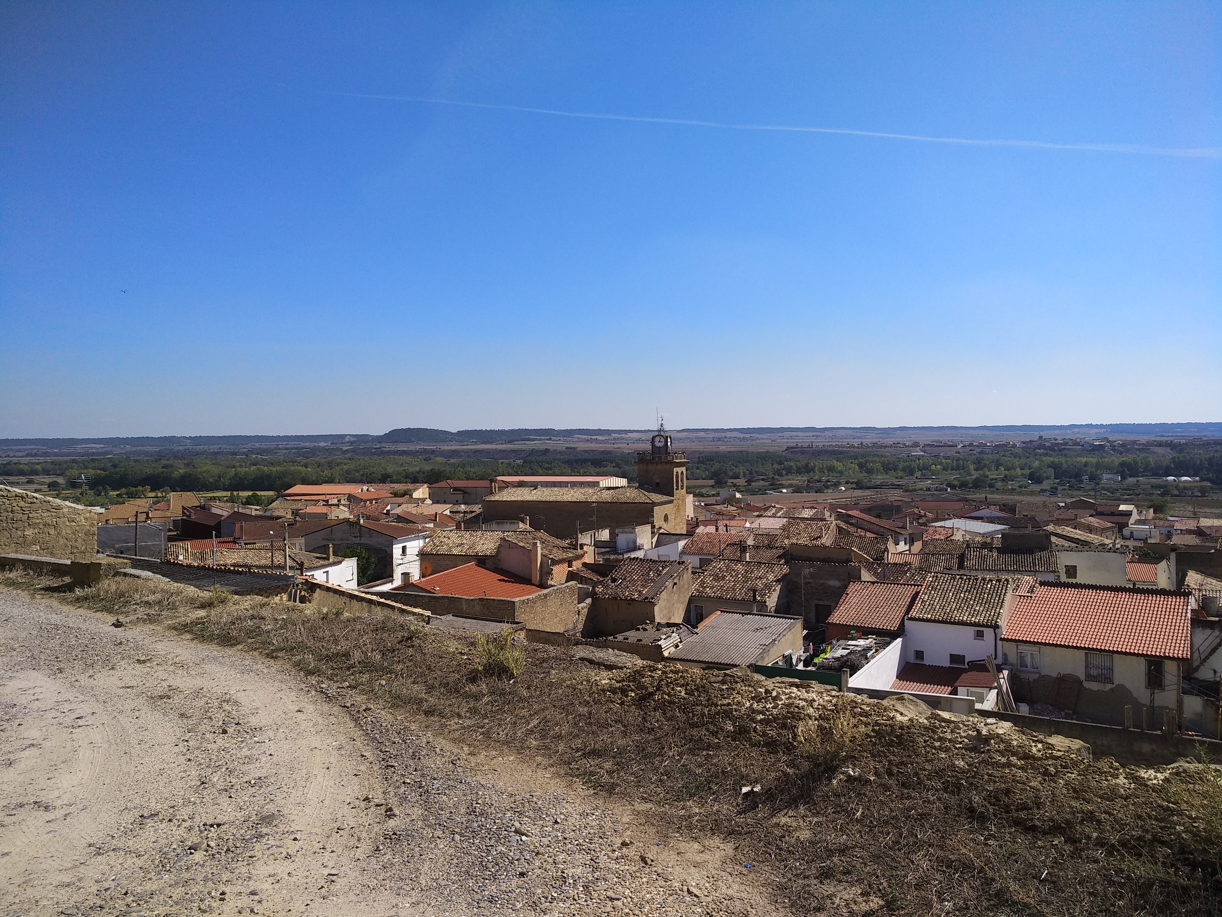 Santacara - Vista desde la subida al castillo